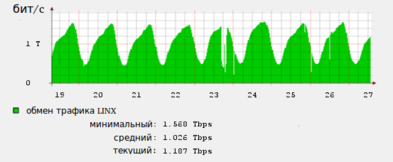 DoS на LINX